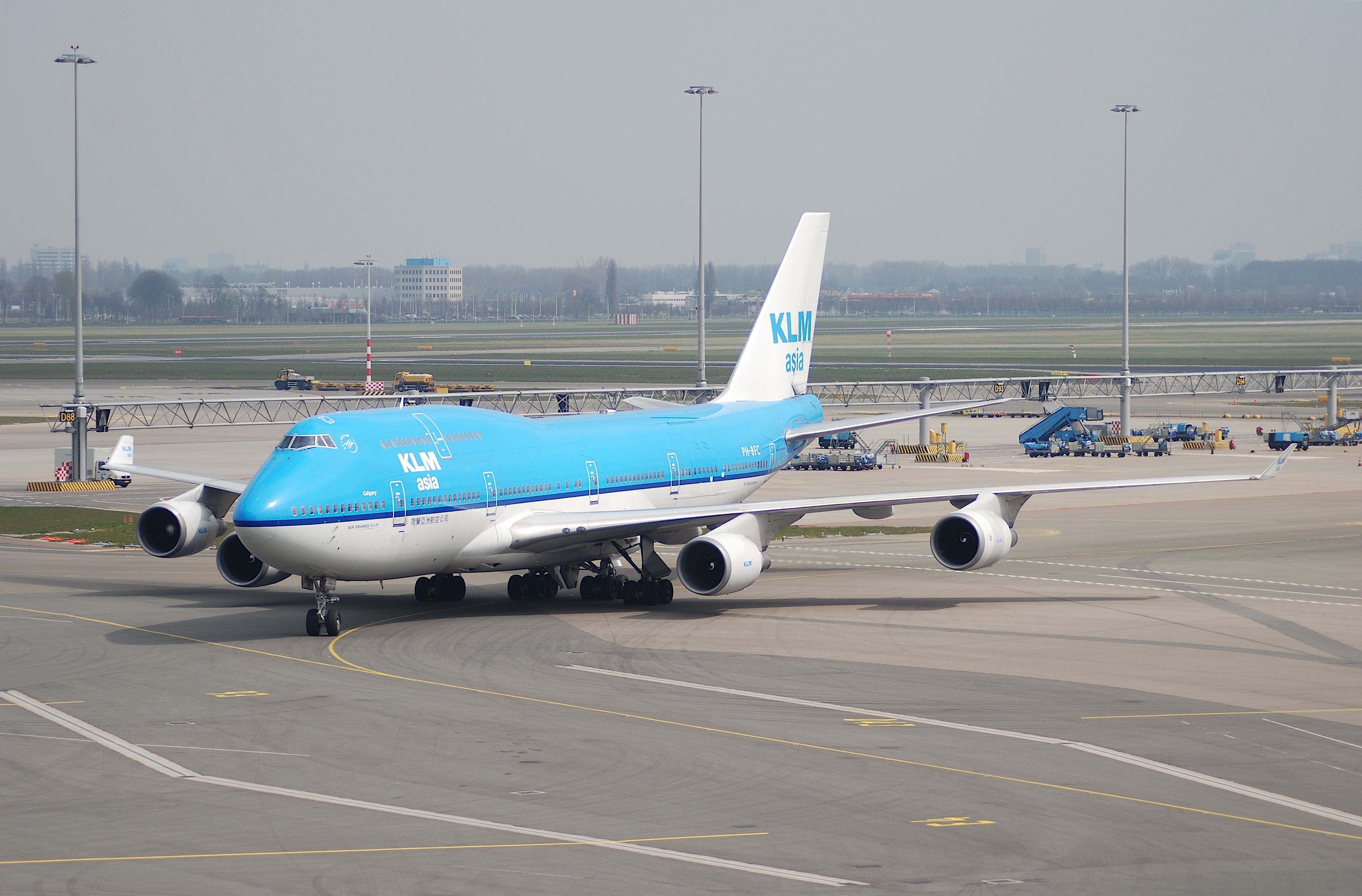 PH-BFC@AMS;19.04.2008/508gn